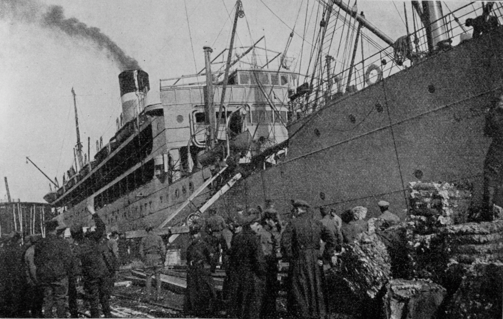 Americká loď Madawaska - jedna z transportních lodí, jimiž byli přepravování českloslovenští legionáři z přístavu ve Vladivostoku zpět do vlasti. Speciálně tato loď realizovala v roce 1920 v pořadí 19. transport příslušnéků československých legií z Vladivostoku (přes Singapur) do Terstu po trase: 9/3/1920 Vladivostok 8:00 12/3/1920 - 23:30 21/3/1920 Singapore 11:00 25/3/1920 - 11:45 30/3/1920 Colombo 12:00 31/31920 - 12/4/1920 Port Said 12/4/1920 - 16/4/1920 Terst. Tímto transportem bylo převezeno celkem přes 2250 osob: 104 důstojníků, 2069 vojínů, 33 občanů, 6 zajatců, 35 žen, 6 dětí a 7 cizích příslušníků.